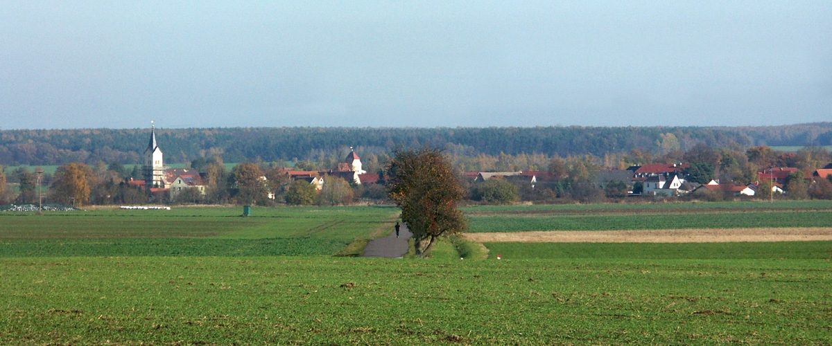 Pötzschau im weiten Göseltal